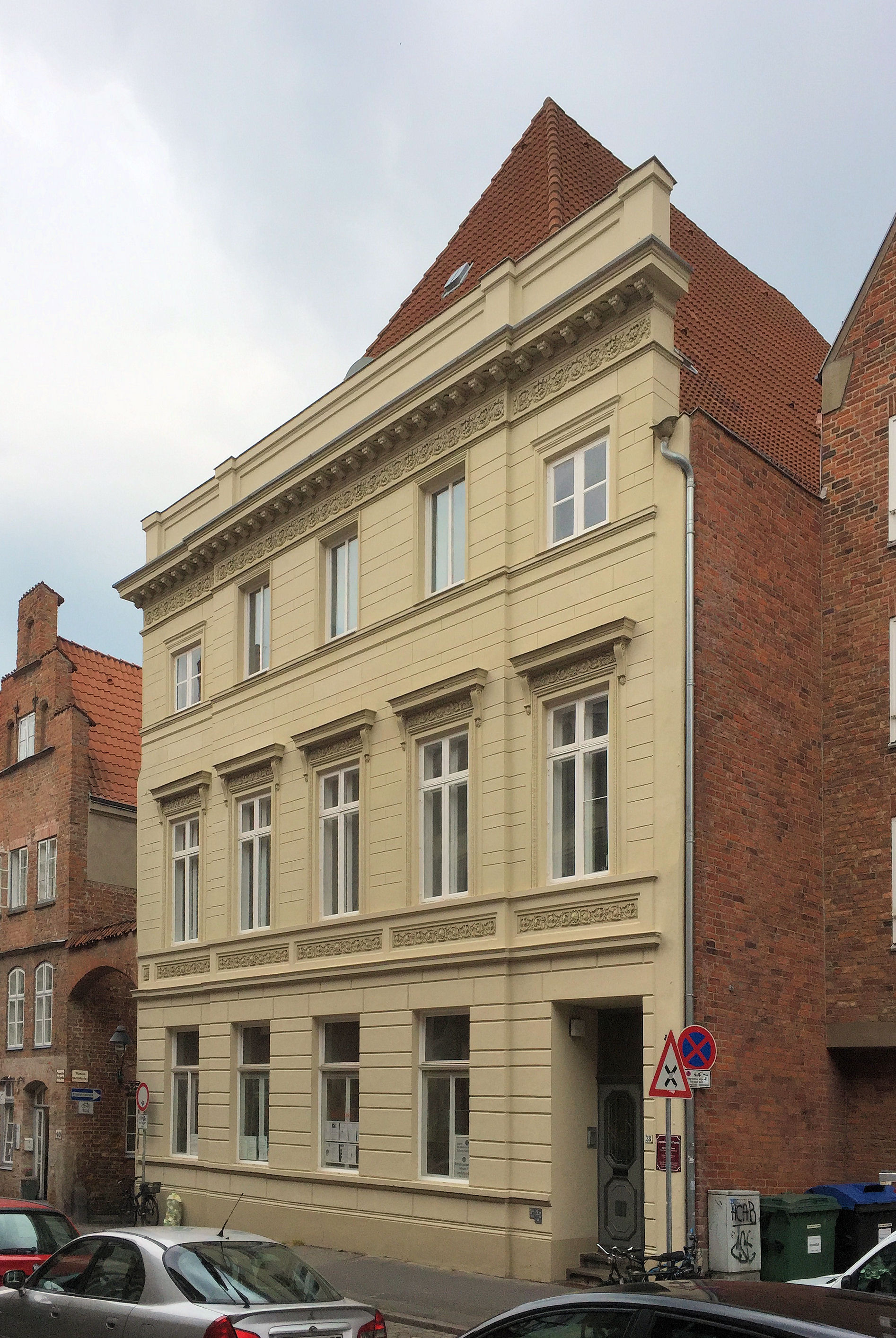 Das Haus Mengstraße 38 in Lübeck